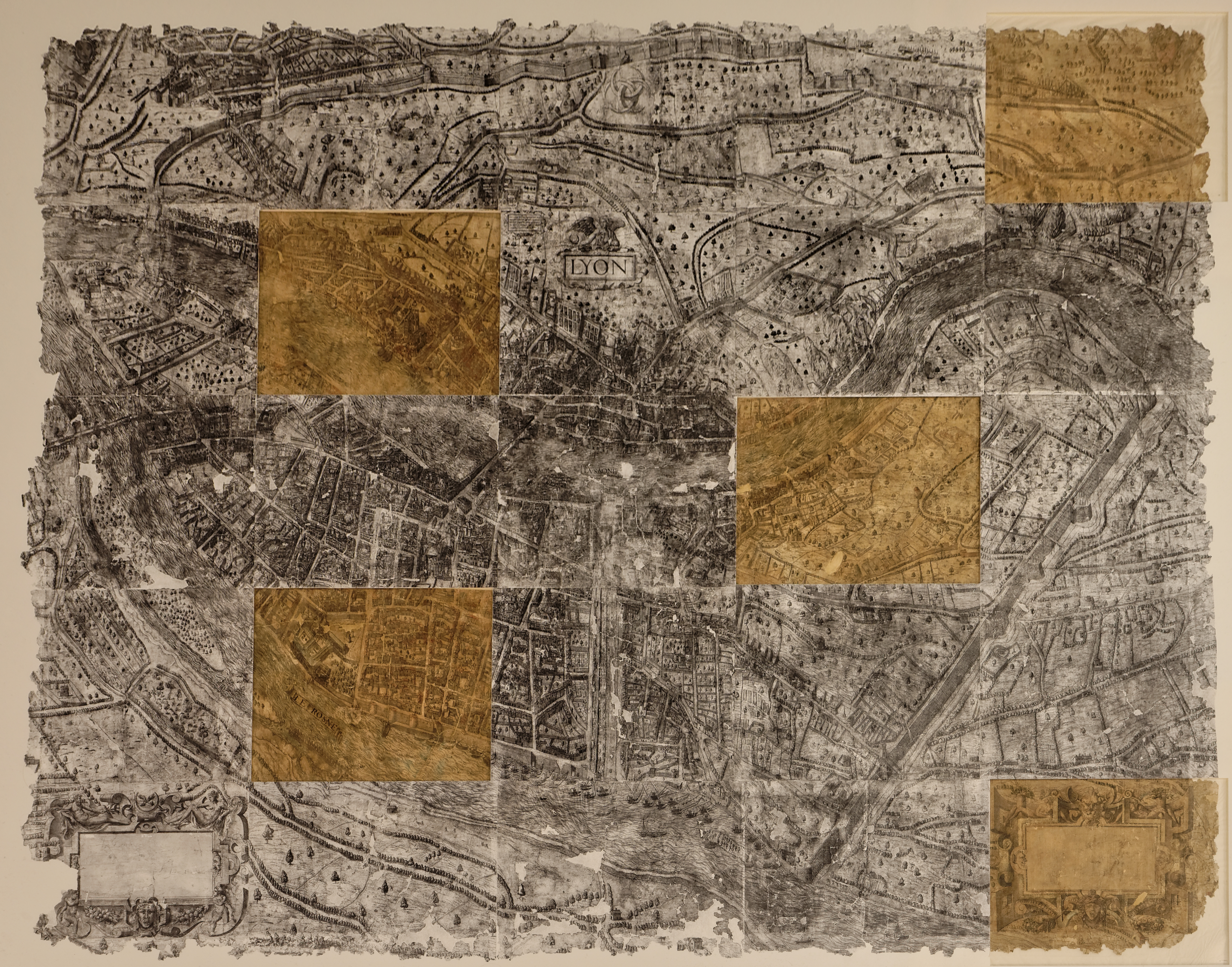 Exposition Lyon Renaissance. Arts et humanisme. Plan scénographie de Lyon, vers 1550